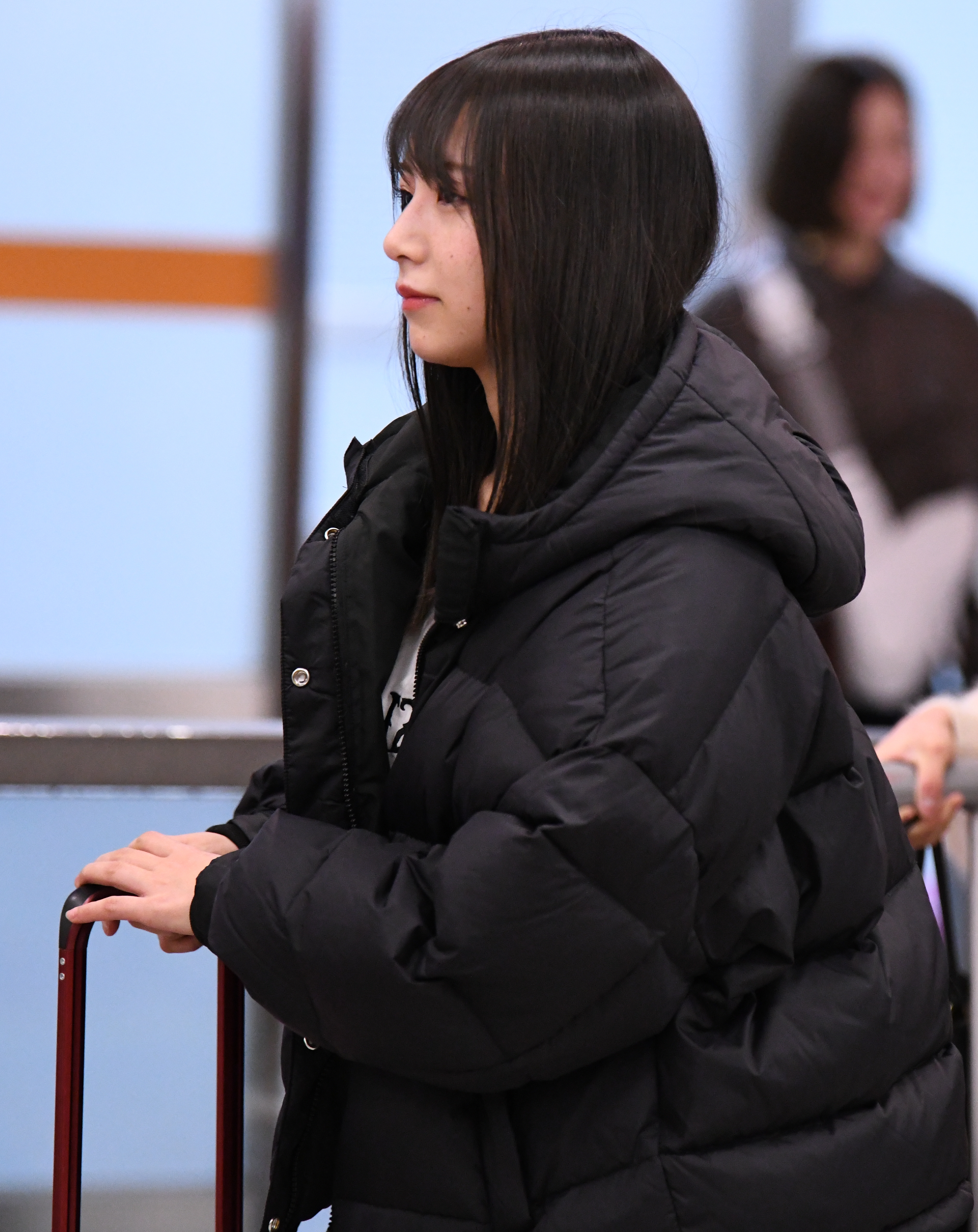 2020.01.18 乃木坂46「NOGIZAKA46 Live in Taipei 2020」抵達台灣@台北松山機場